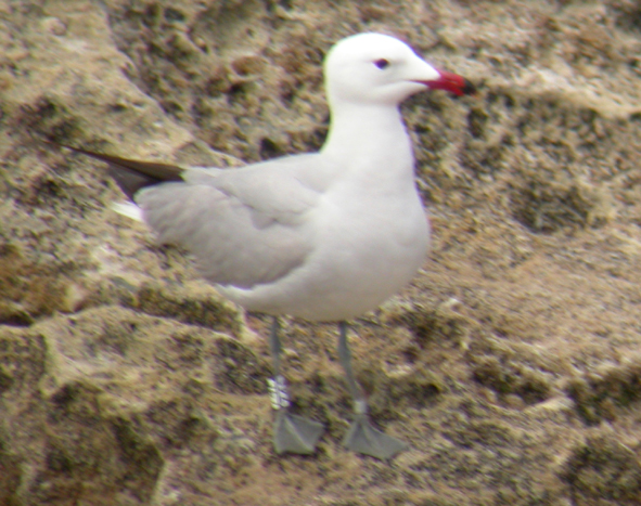 Korallenmöwe (Ichthyaetus audouinii) seitlich, Ort "Punta de ses Portes" Ibiza, Spanien